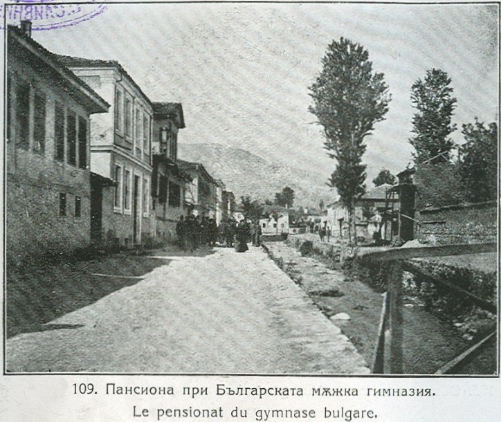 Bitolya bulgarian school pansion